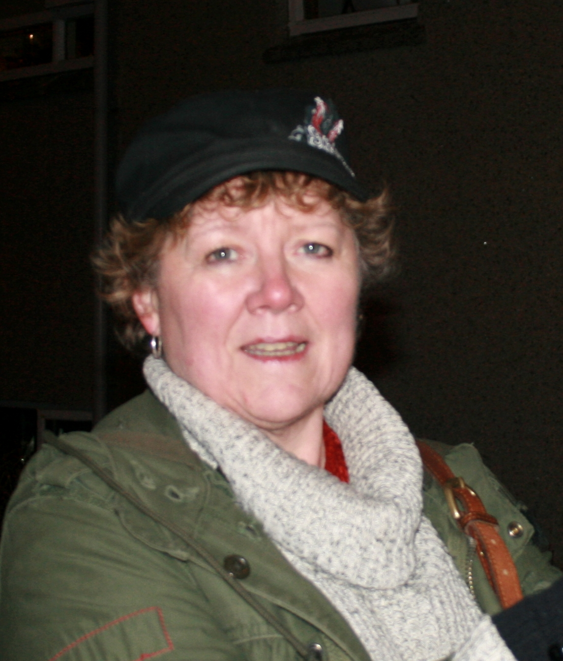 Rithöfundur, leikritaskáld